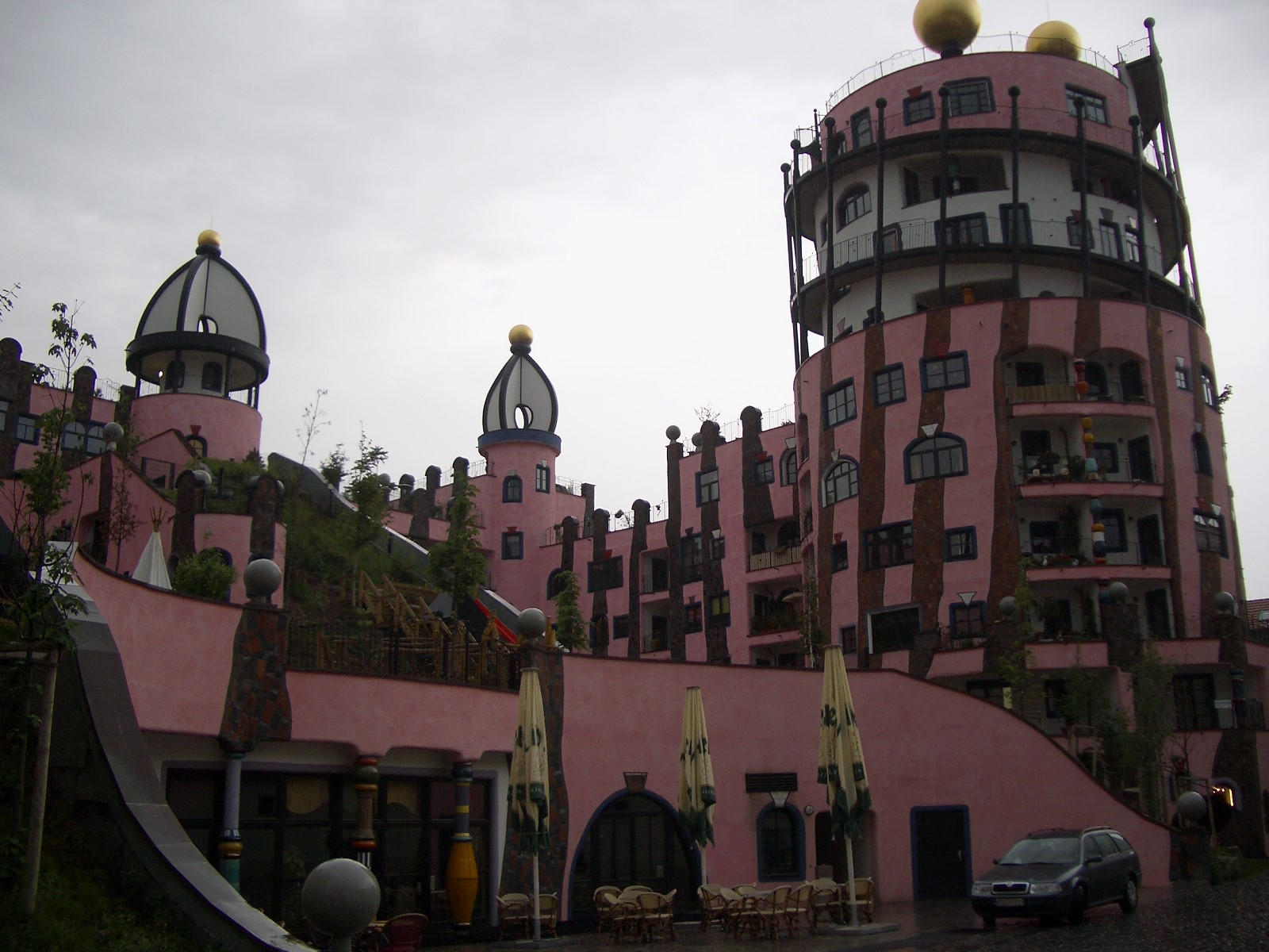 Bauwerk Grüne Zitadelle von Magdeburg. Architekt: Friedensreich Hundertwasser, Einweihung: 3. Oktober 2005. Standort: Breiter Weg in Magdeburg. Blick auf die Rückseite des Gebäudes.